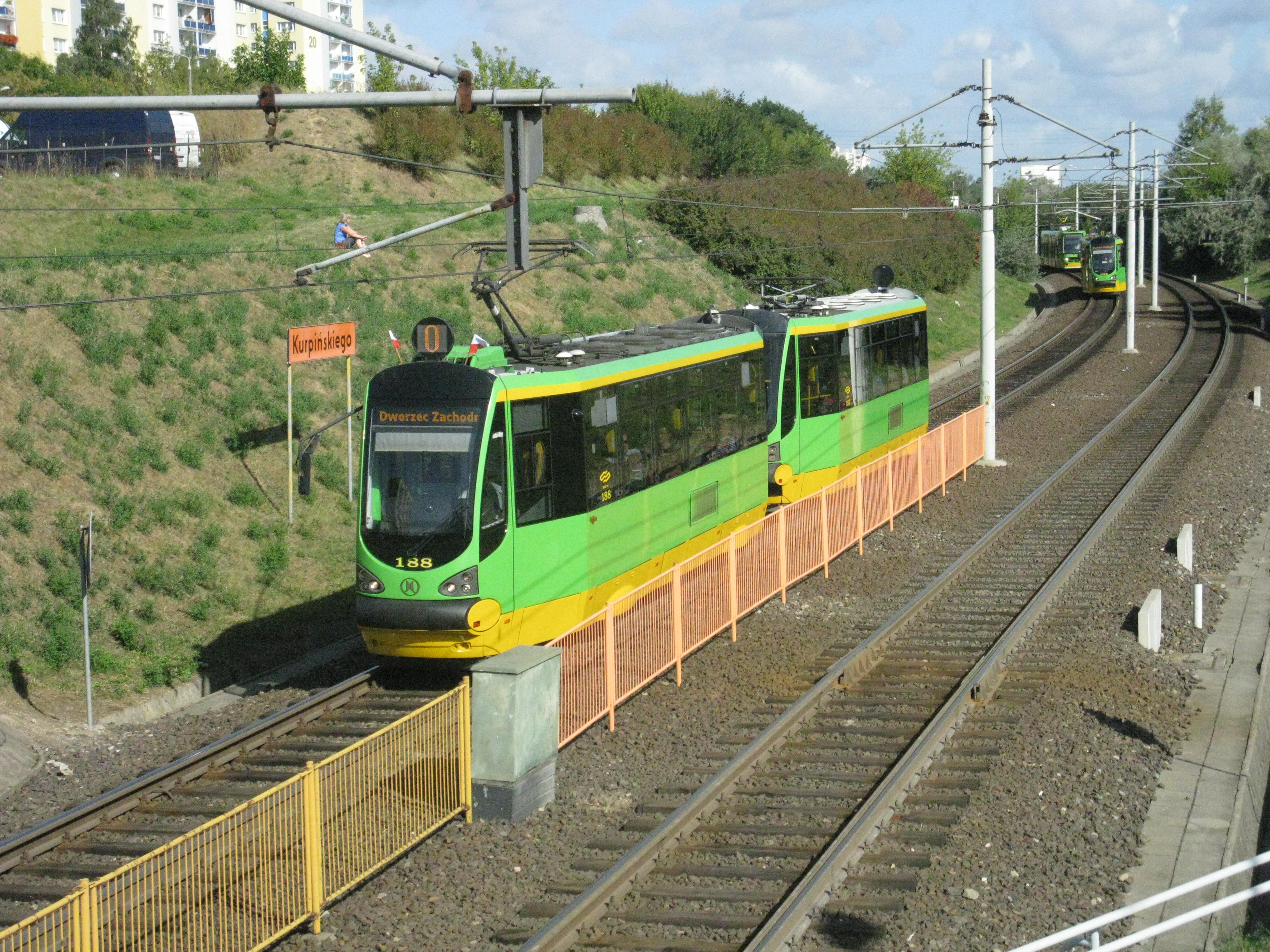 Parada tramwajów z okazji otwarcia przedłużonej trasy PST do dworca zachodniego